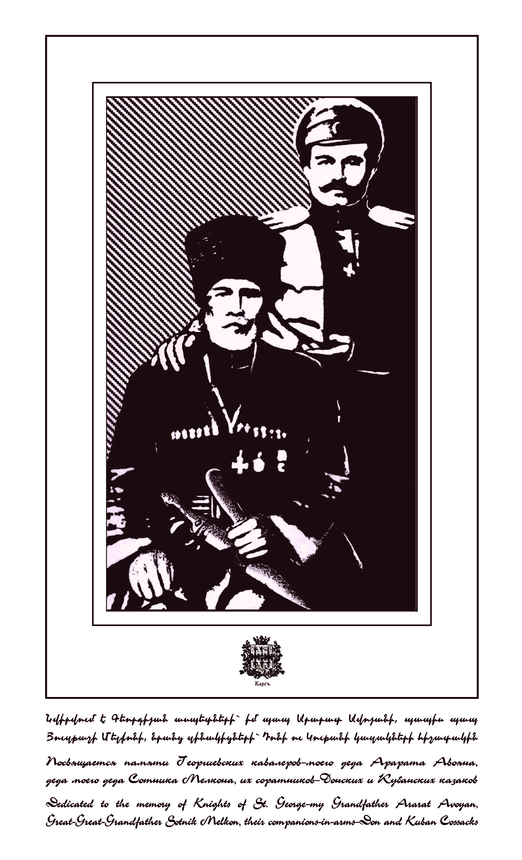 Գեորգիյան ասպետներ` Հայկ Քոթանջյանի պապի պապ Յուզբաշի Մելքոնն ու պապ Արարատ Ավոյանը